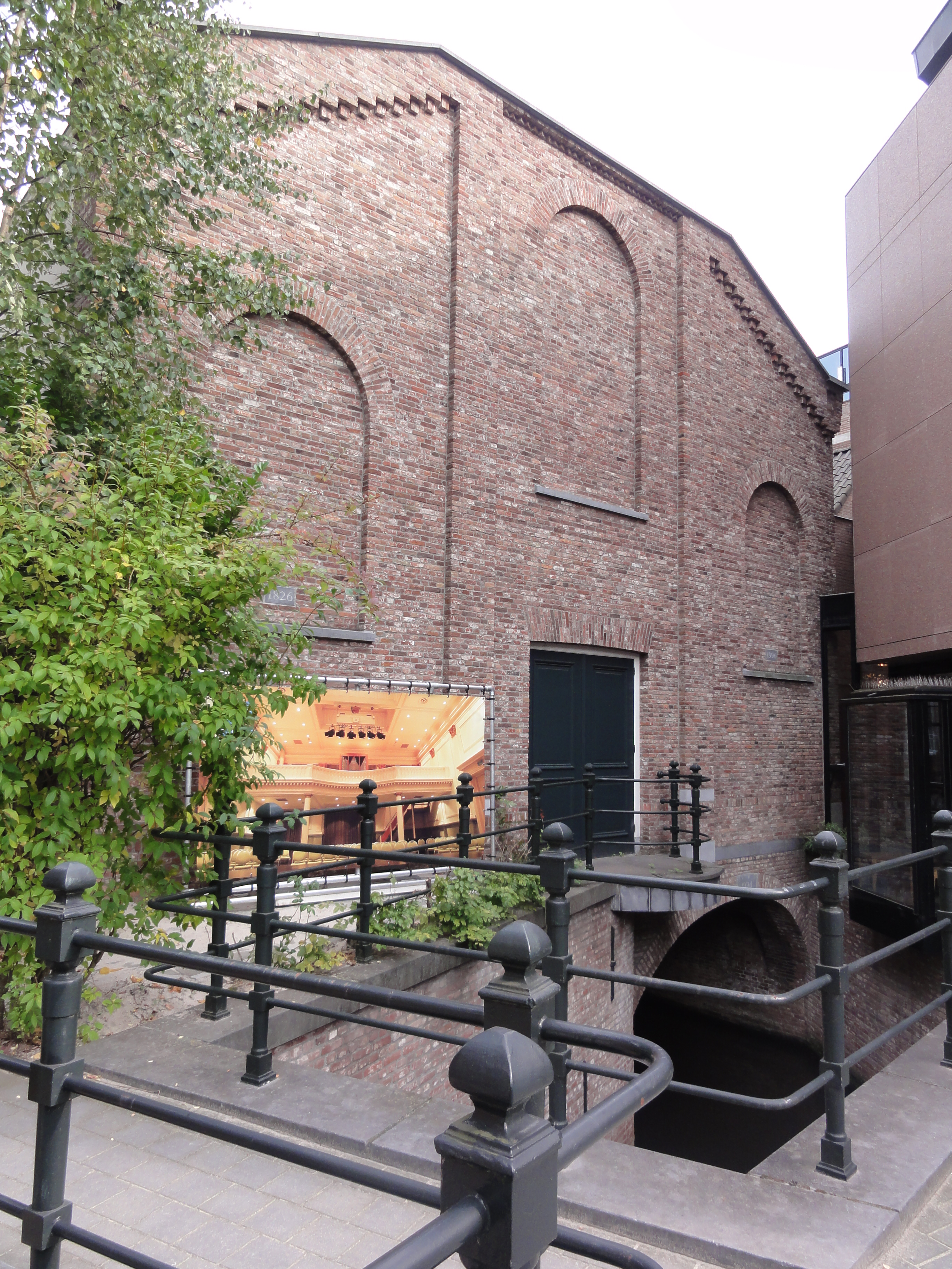 's-Hertogenbosch Rijksmonument 333500 Synagoge Prins Bernhardstraat bij 8